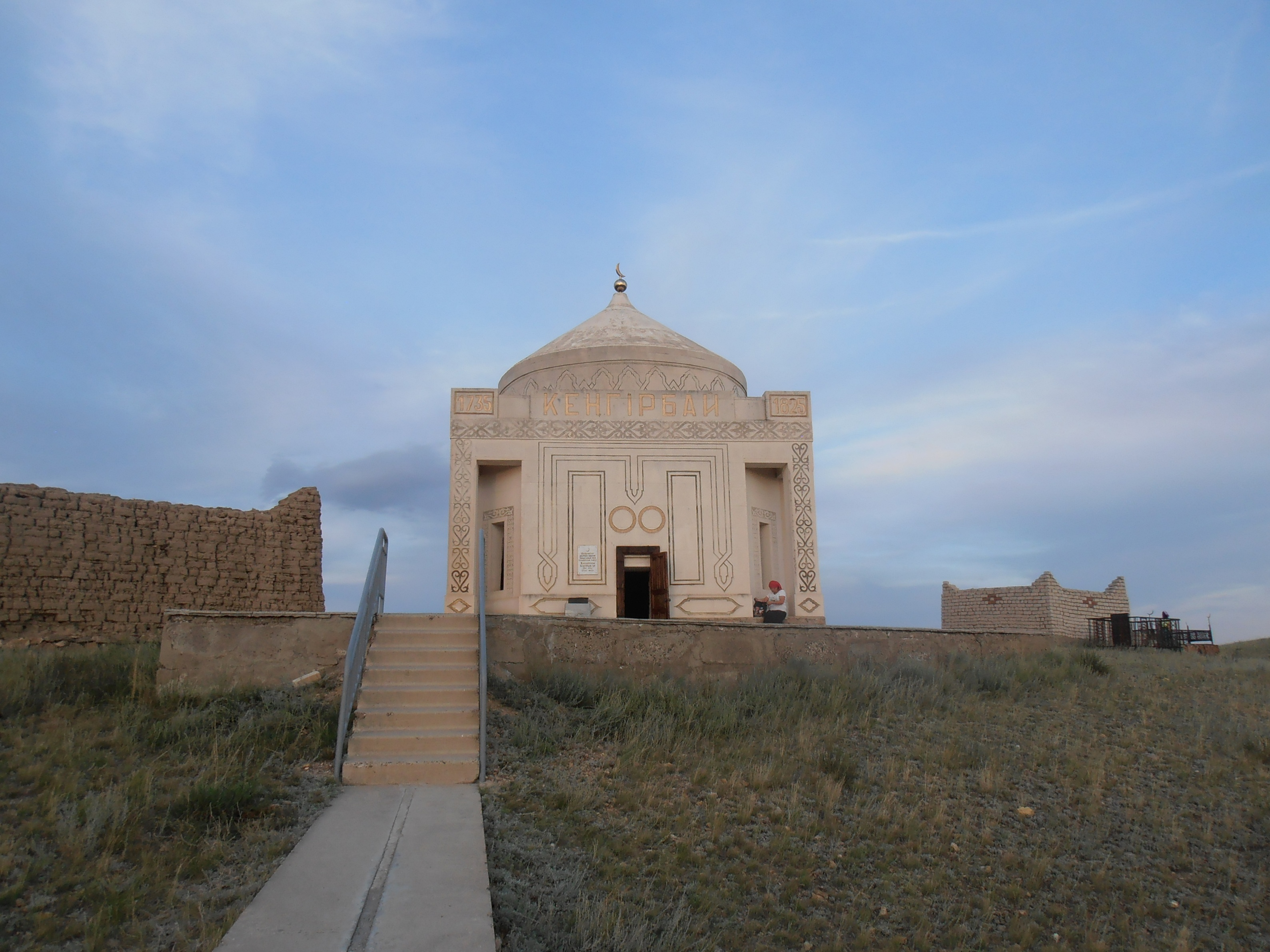 Мавзолей Кенгирбая-би Жандосулы (1735-1825) в заповеднике Жидебай Абайского района Восточно-Казахстанской области (33 км к юго-востоку от села Караул).